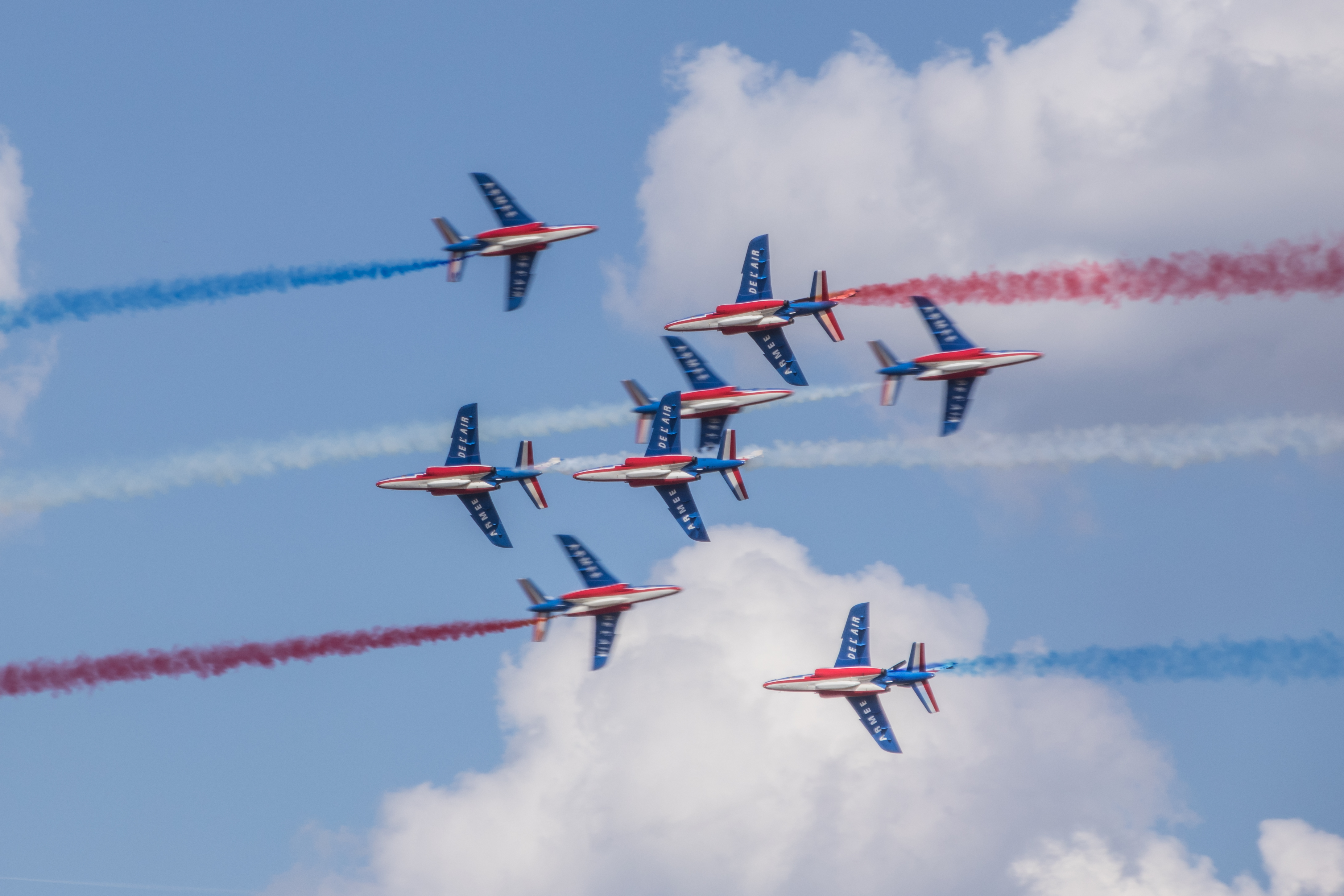 Croisement sur la tranche des 8 appareils de la Patrouille de France.